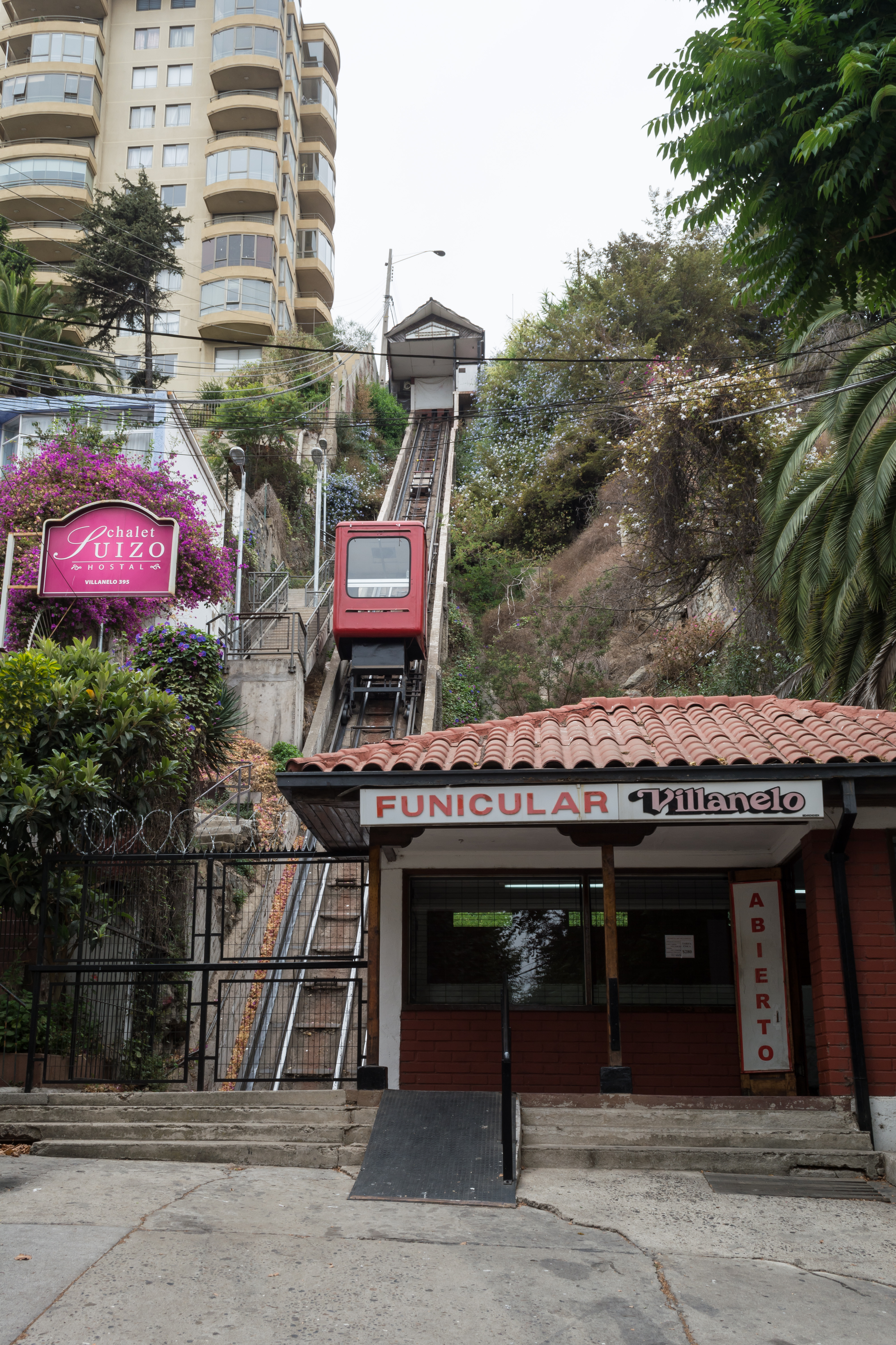 Funicular Villanelo, Viña del Mar, Región de Valparaíso, Chile